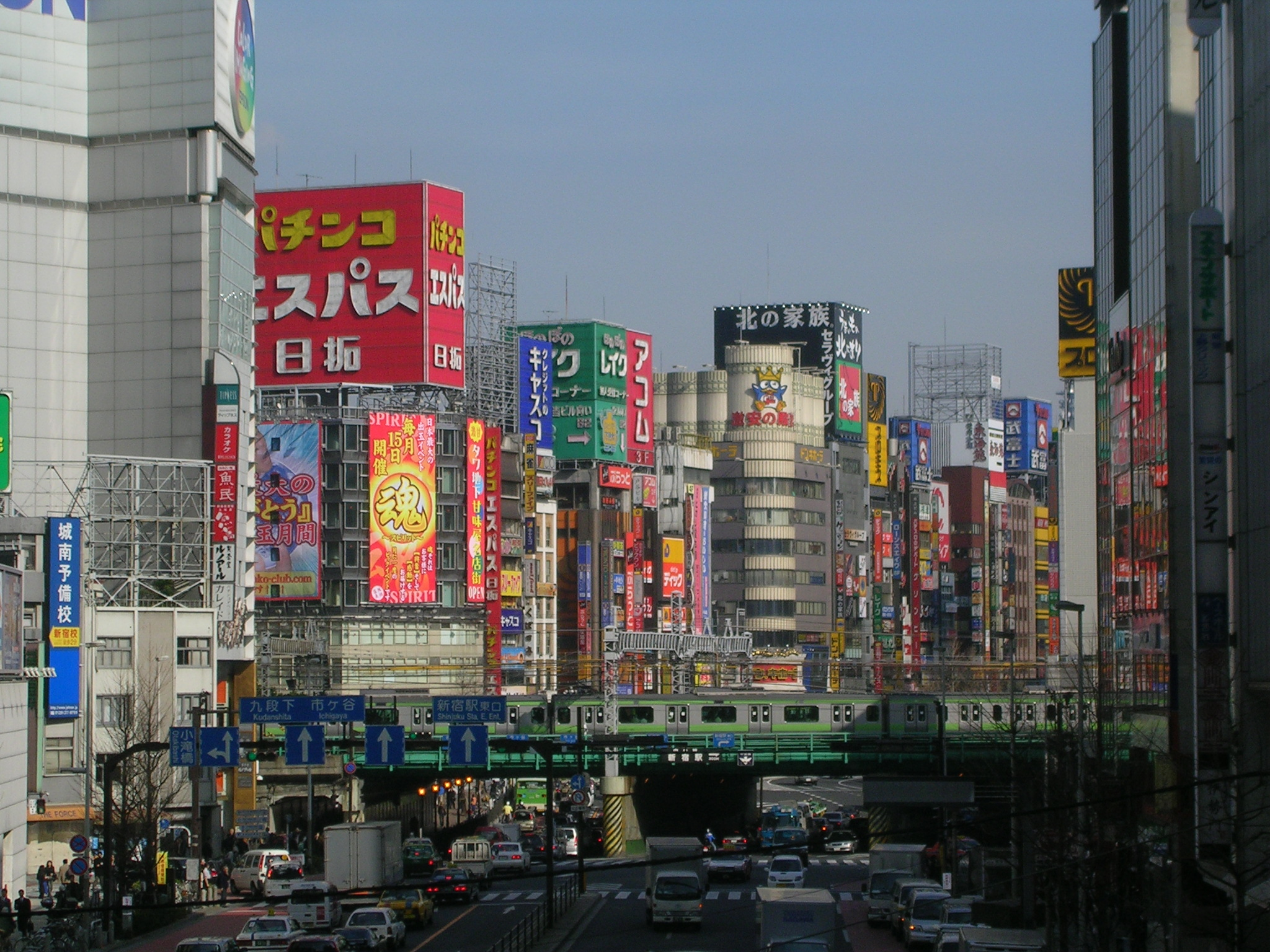 Kabukichō de jour, Tokyo